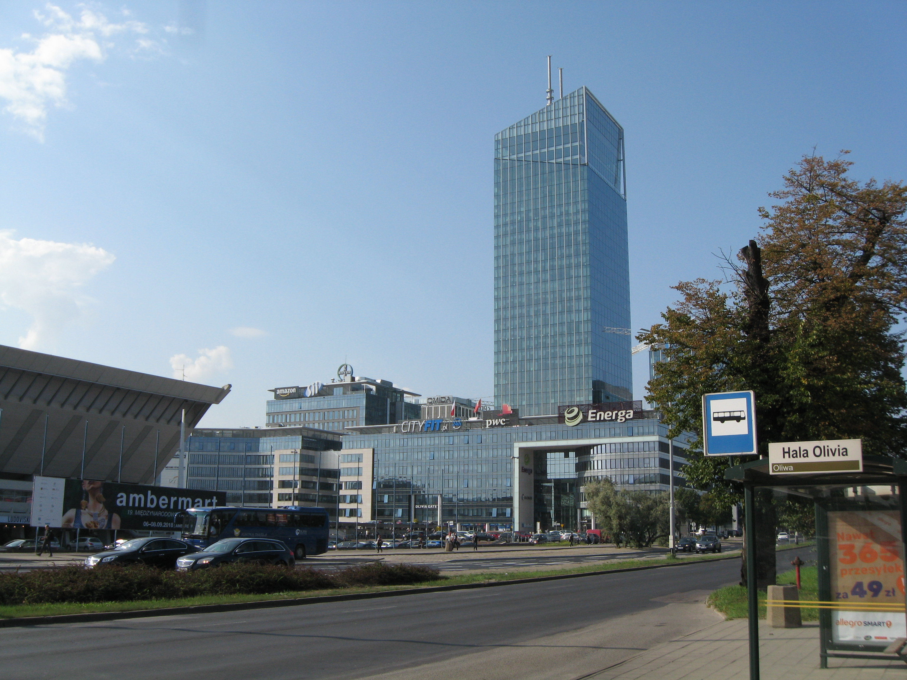 Olivia Business Centre z najwyższym budynkiem Olivia Star